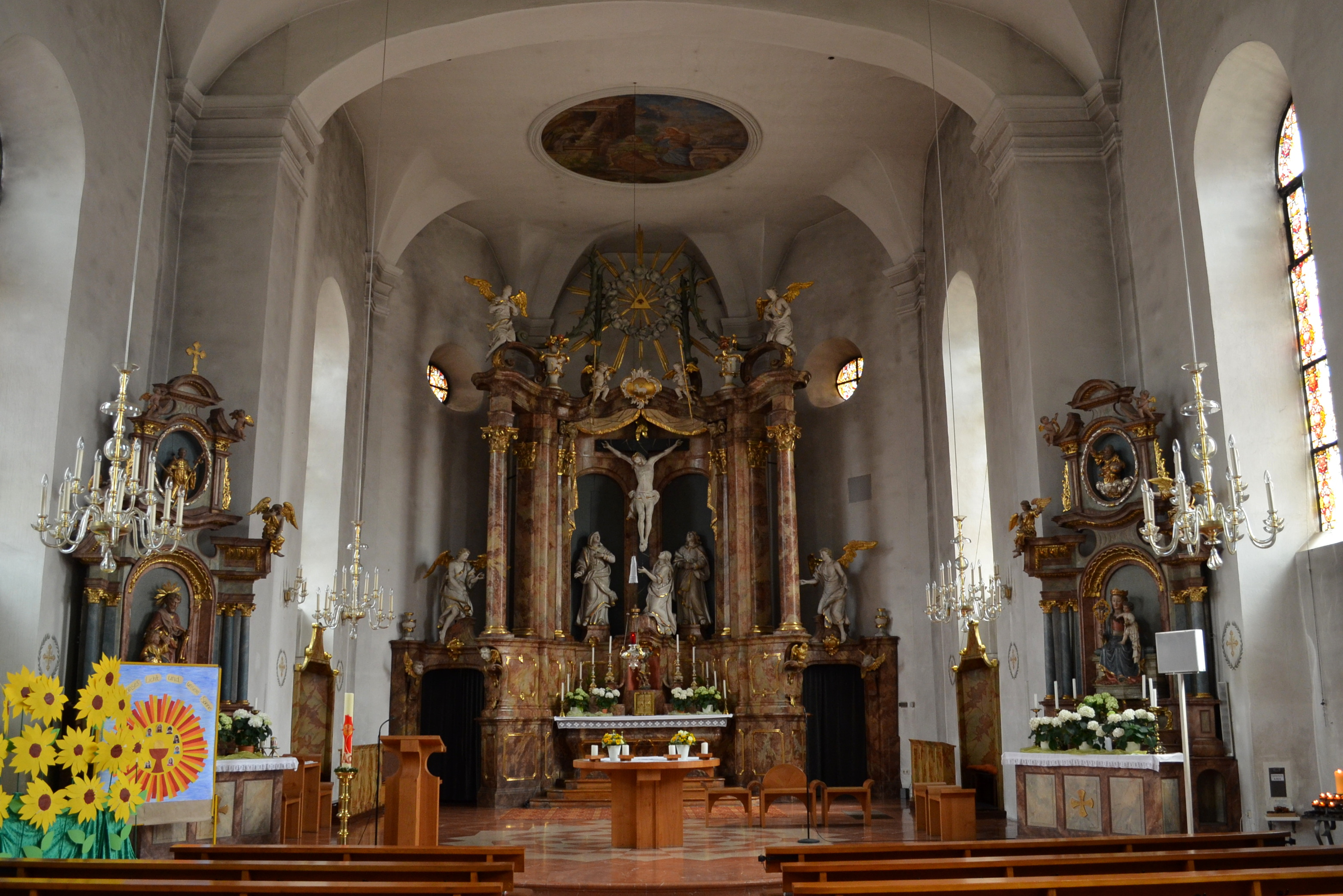 Altaren